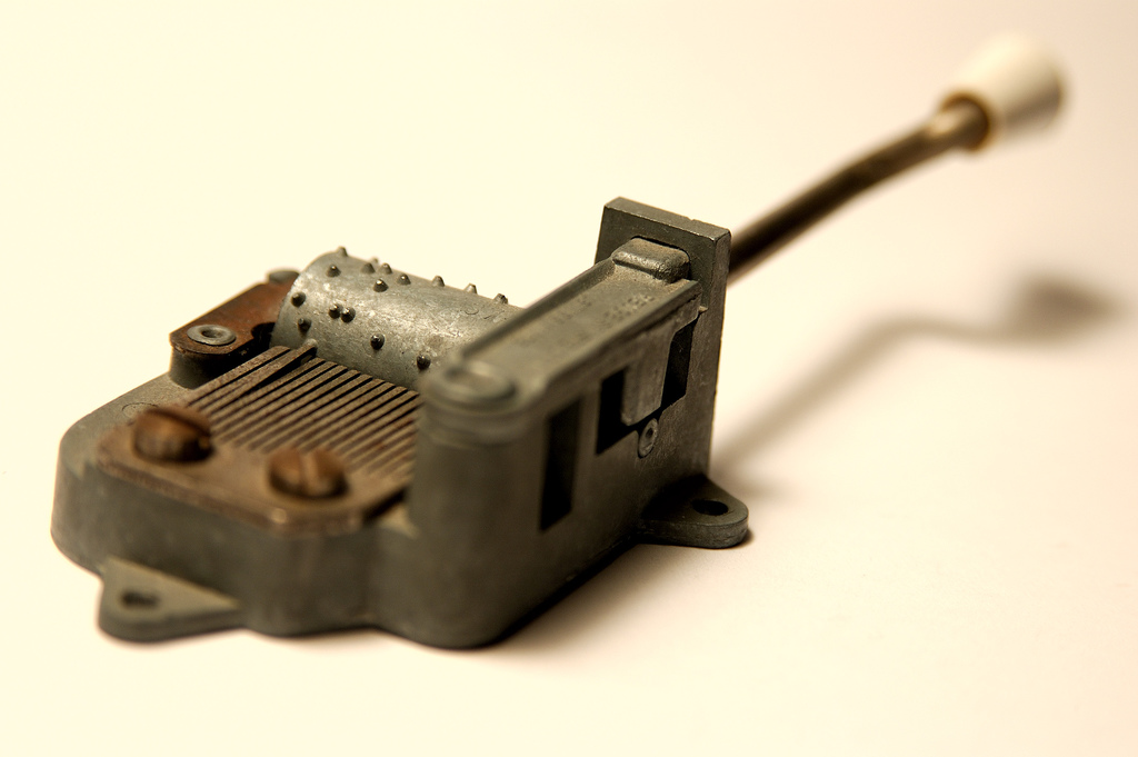 Mini caixa de Música. Artesanato de Braga.